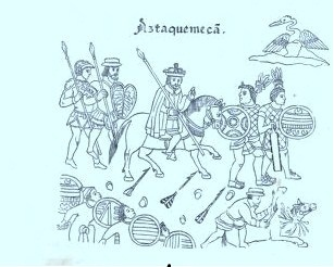 Representación de la batalla de Aztaquemecan (Aztacuemecan) en el Lienzo de Tlaxcala